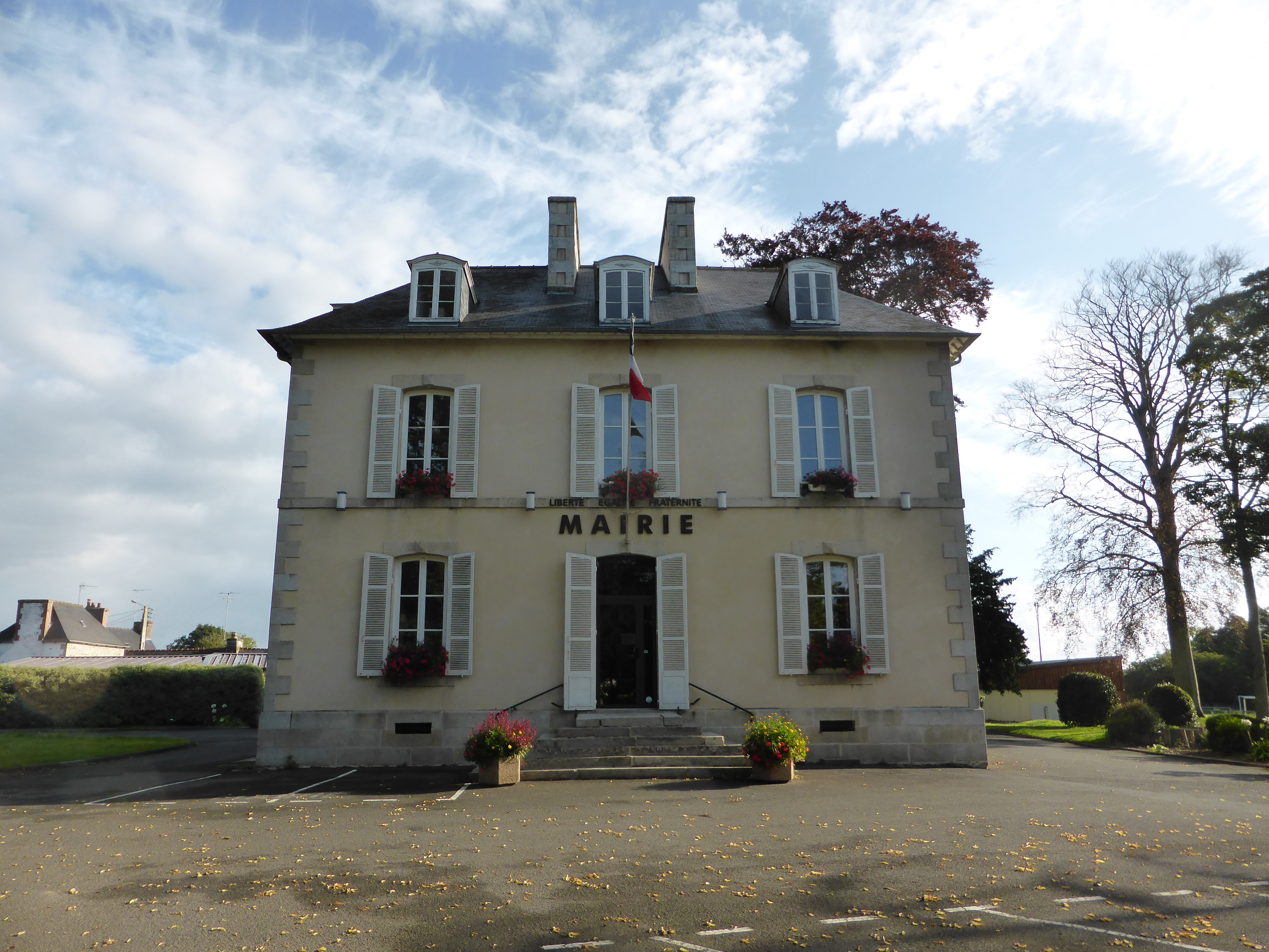 Mairie de Plourhan dans les Côtes-d'Armor, en France.